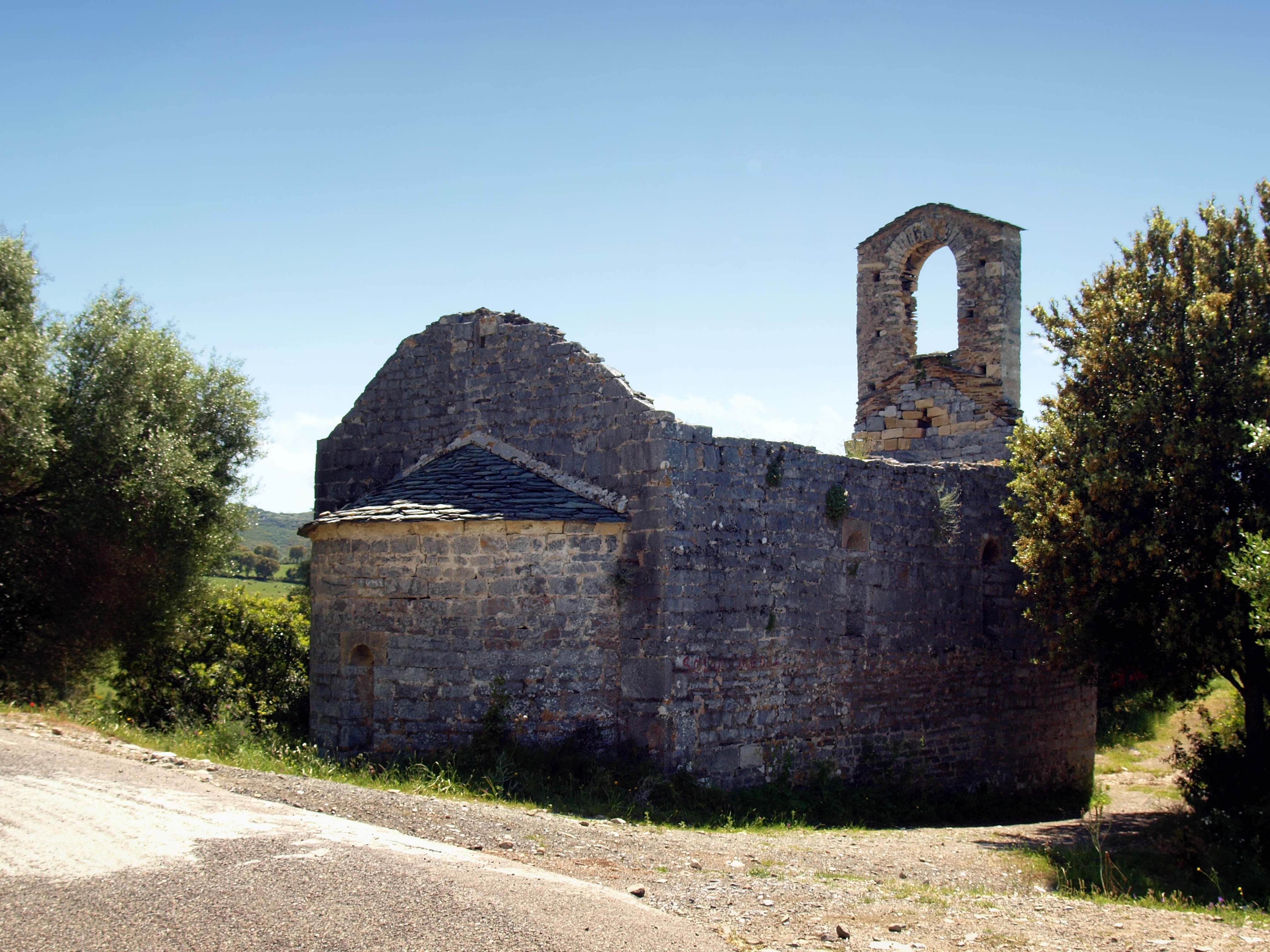 Poggio-d'Oletta, Nebbio (Corse) - Chevet de l'ancienne chapelle San Quilico du XIe, classée MH